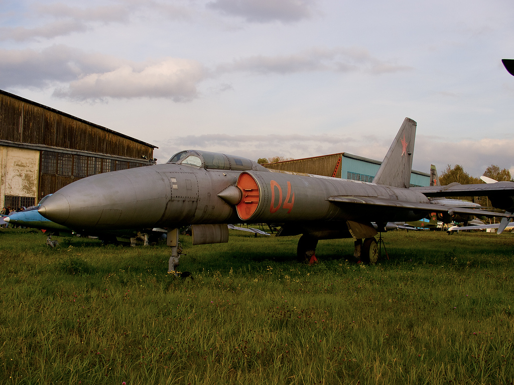 Lavochkin_La-250